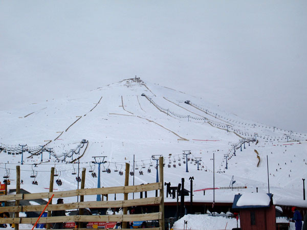 Vista de las canchas de esquí de Valle Nevado, al oriente de Santiago de Chile.